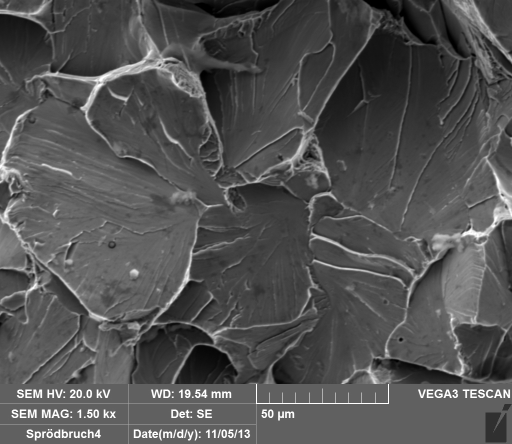 Rasterelektonenmikroskopische Aufnahme eines Sprödbruches